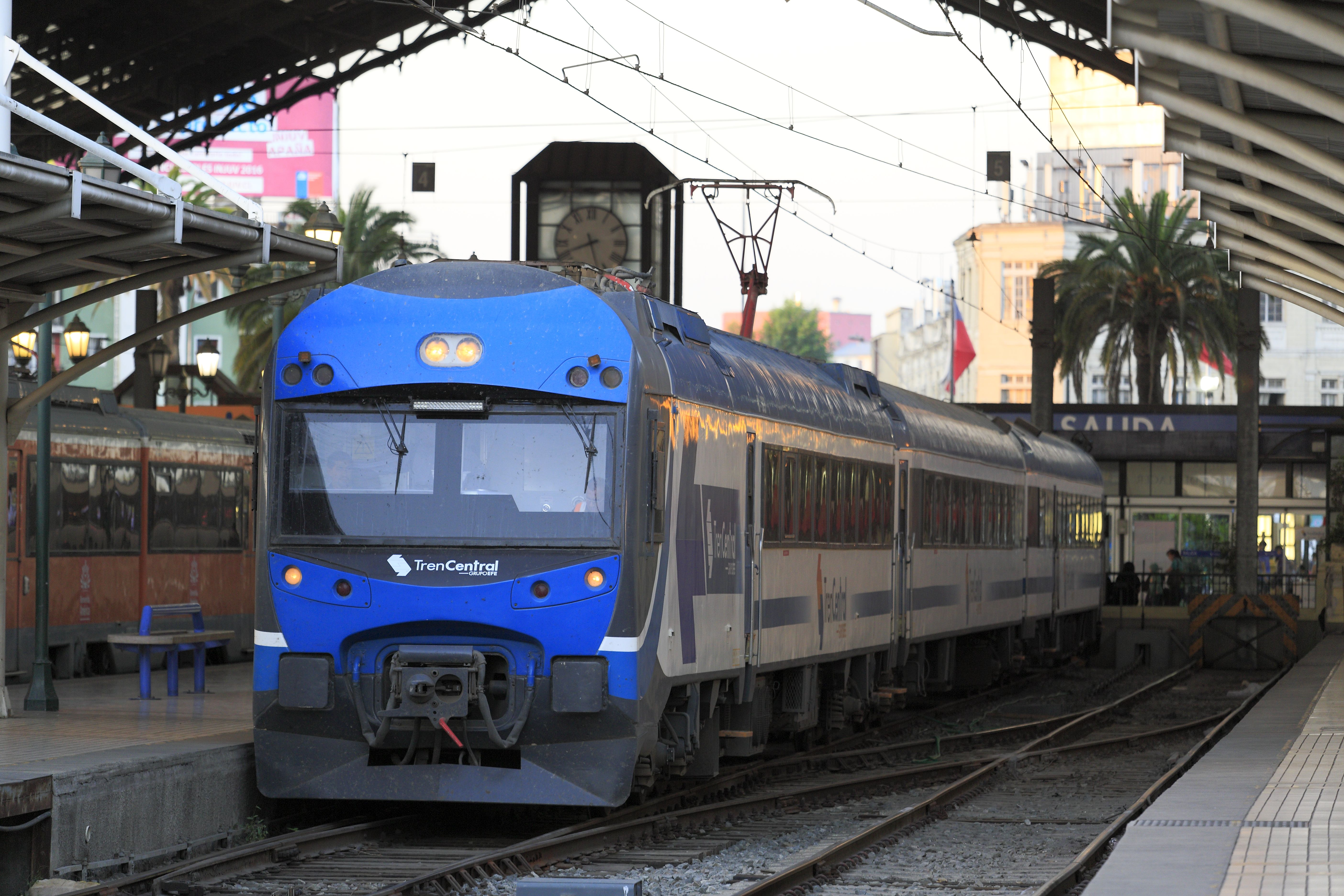 Fernbahntriebzug, ehemals »electrotrén« der Renfe. Die Einheiten werden als »TerraSur« nach Chillán eingesetzt, doch ist der derzeitige Betrieb mit nur einem Zugpaar pro Tag ausgesprochen dünn. Triebwagen, die Führerstandsenden wurden noch während der Betriebszeit in Spanien geändert. Auffällig ist die kurze Bahnsteighalle, die nur Platz für drei Wagenlängen bietet, allerdings schon kurz nach der Mitte des 19. Jahrhunderts gebaut worden ist.Der Name estación central ging auf das gesamte Stadtviertel über, die Bahnverwaltung selber beueichnet den Hauptbahnhof in Fahrplänen und auf den Schildern nach der breiten und baumbestandenen Avenida Libertador Bernardo O’Higgins davor mit Alameda.